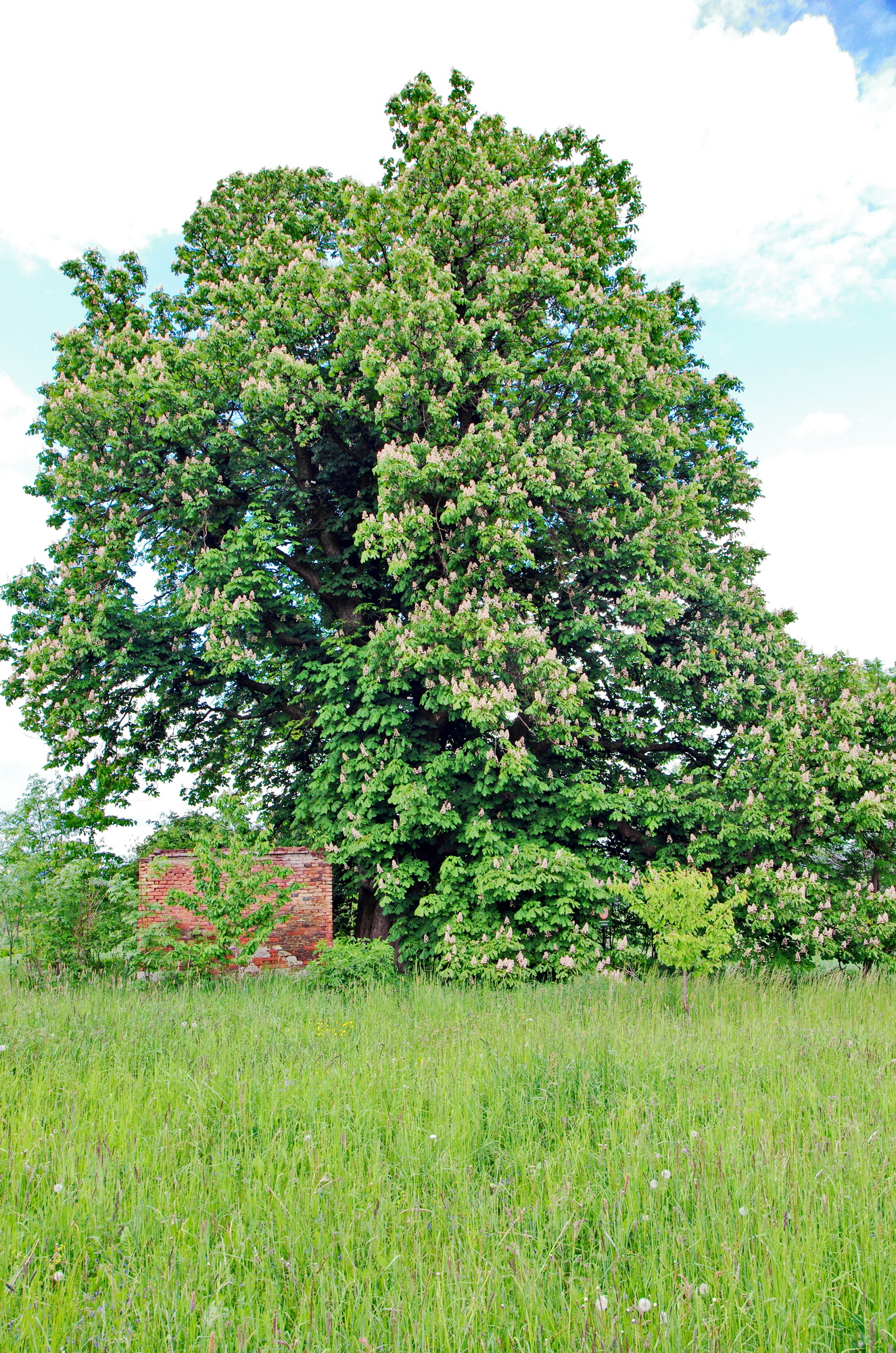 památný strom Jírovec u Mariánské kapličky v Jankovicích, Jankovice, okres Cheb